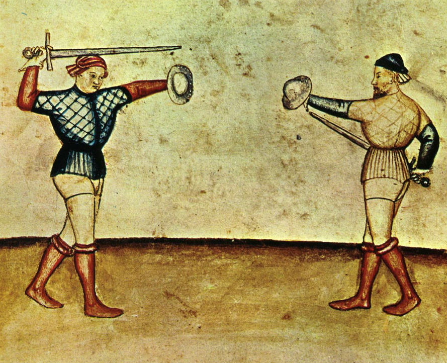 Tacuina sanitatis (XIV century) 8-svaghi C lotta Taccuino Sanitatis Casanatense 4182. detail